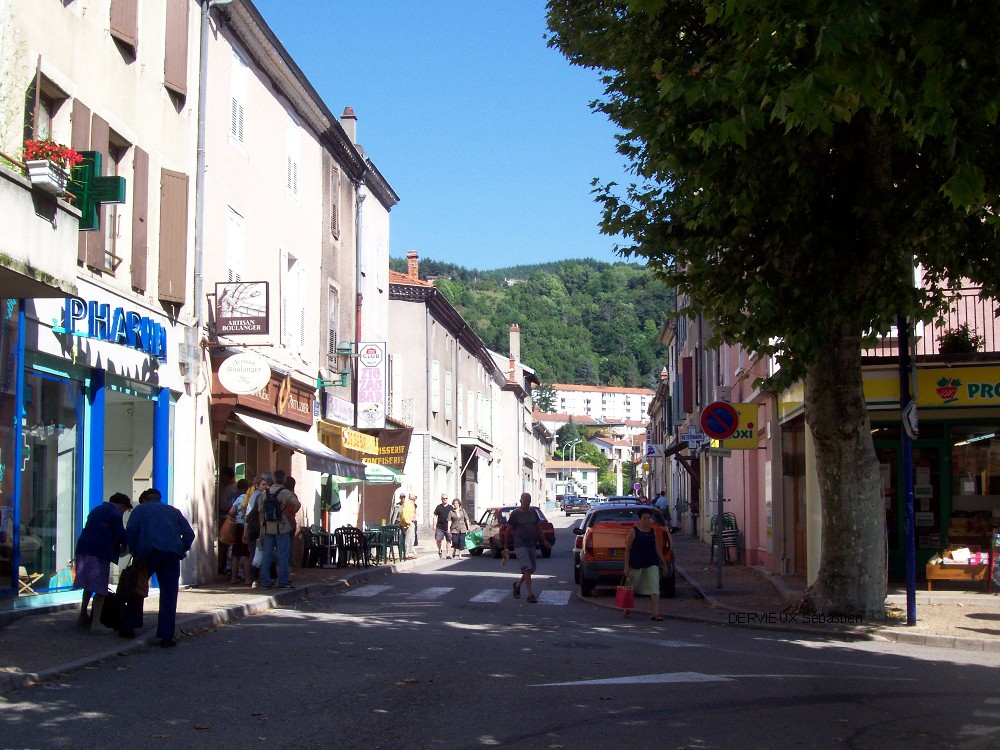 Une rue commerçante à Lamastre